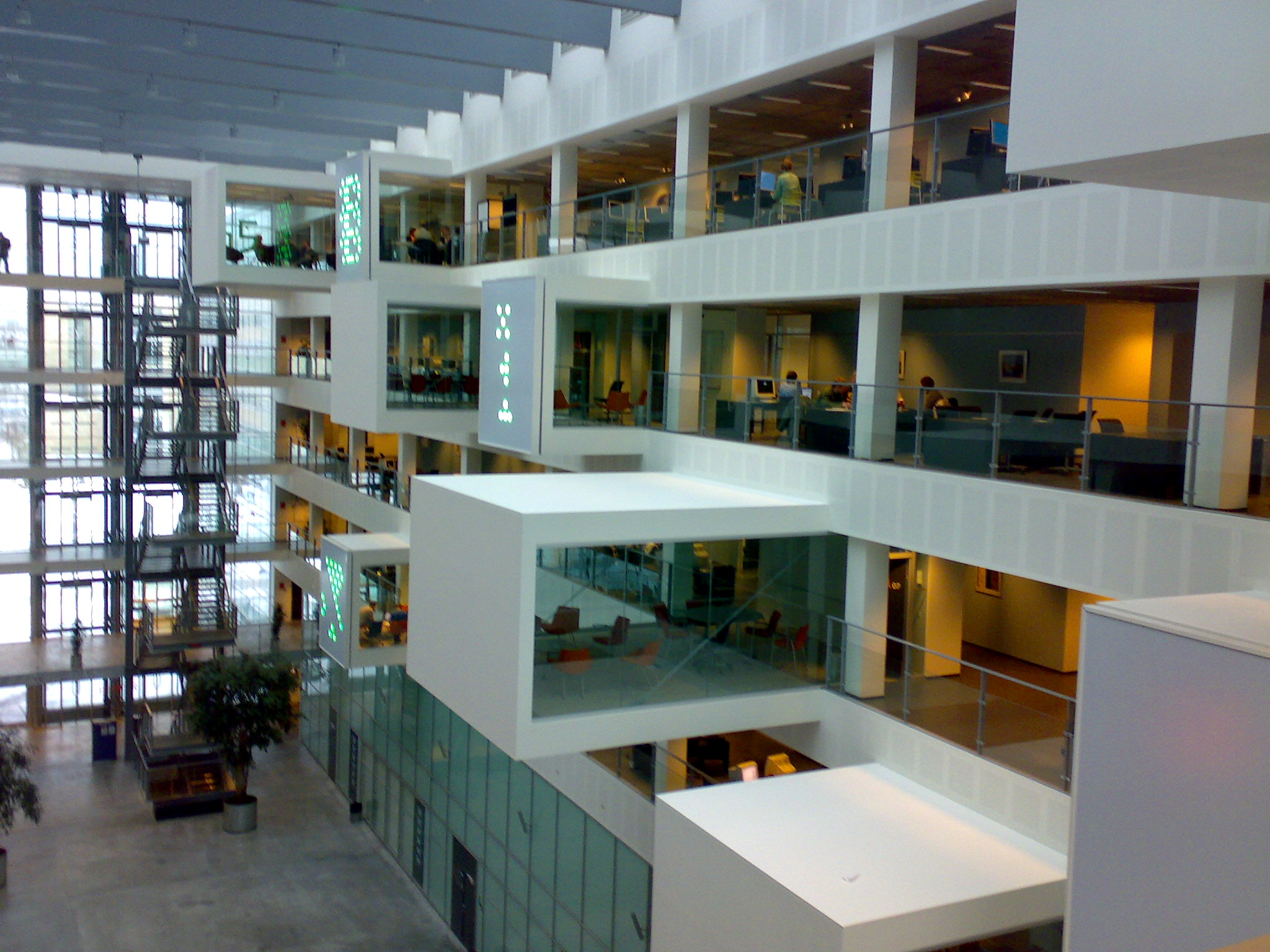 IT-University of Copenhagen (IT-Universitetet i København).